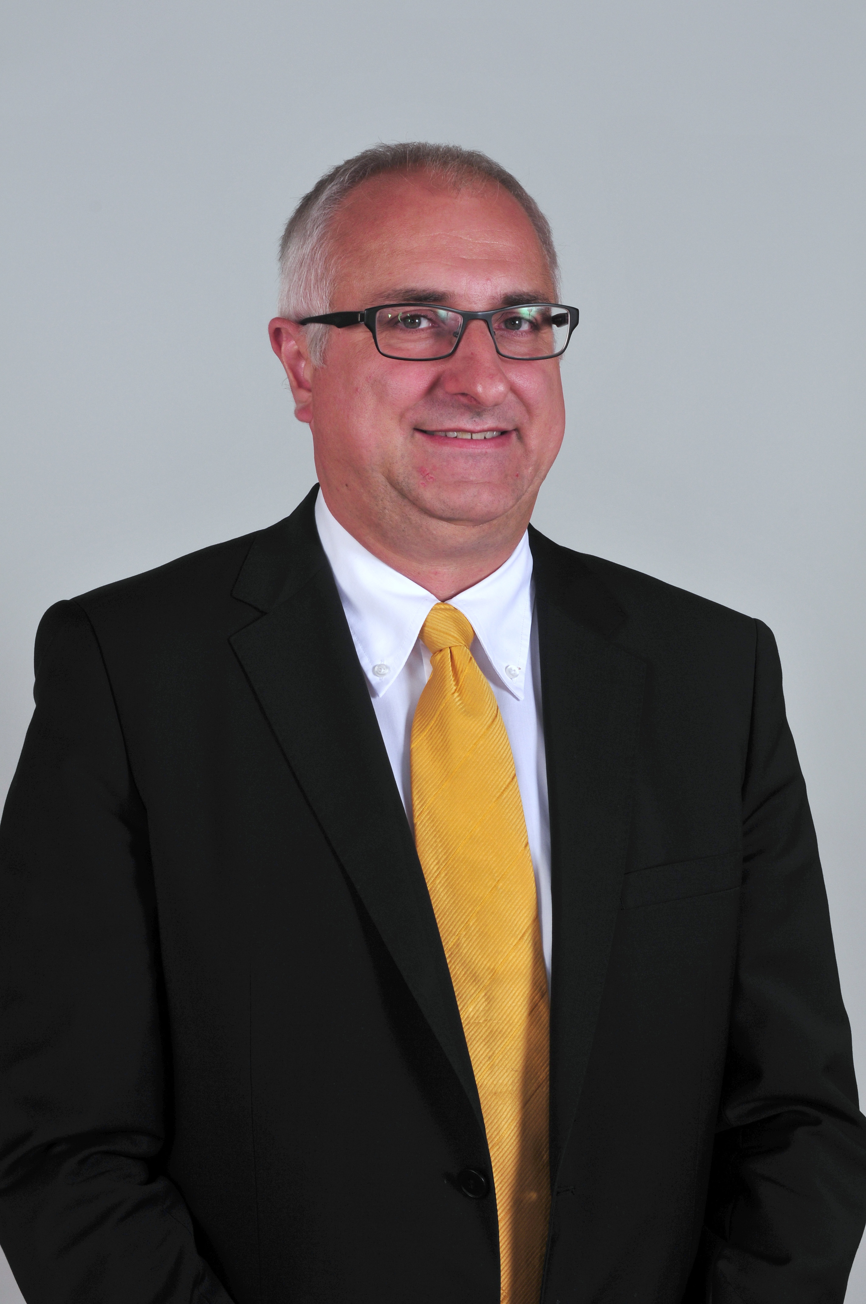 Landtagsprojekt Bayern The making of this document was supported by Wikimedia Austria. Wikipedia im Landtag – Bayern 17. bis 19. Juli 2012 in München Dieses Foto wurde im Rahmen des Projektes „Wikipedia im Landtag“ erstellt.